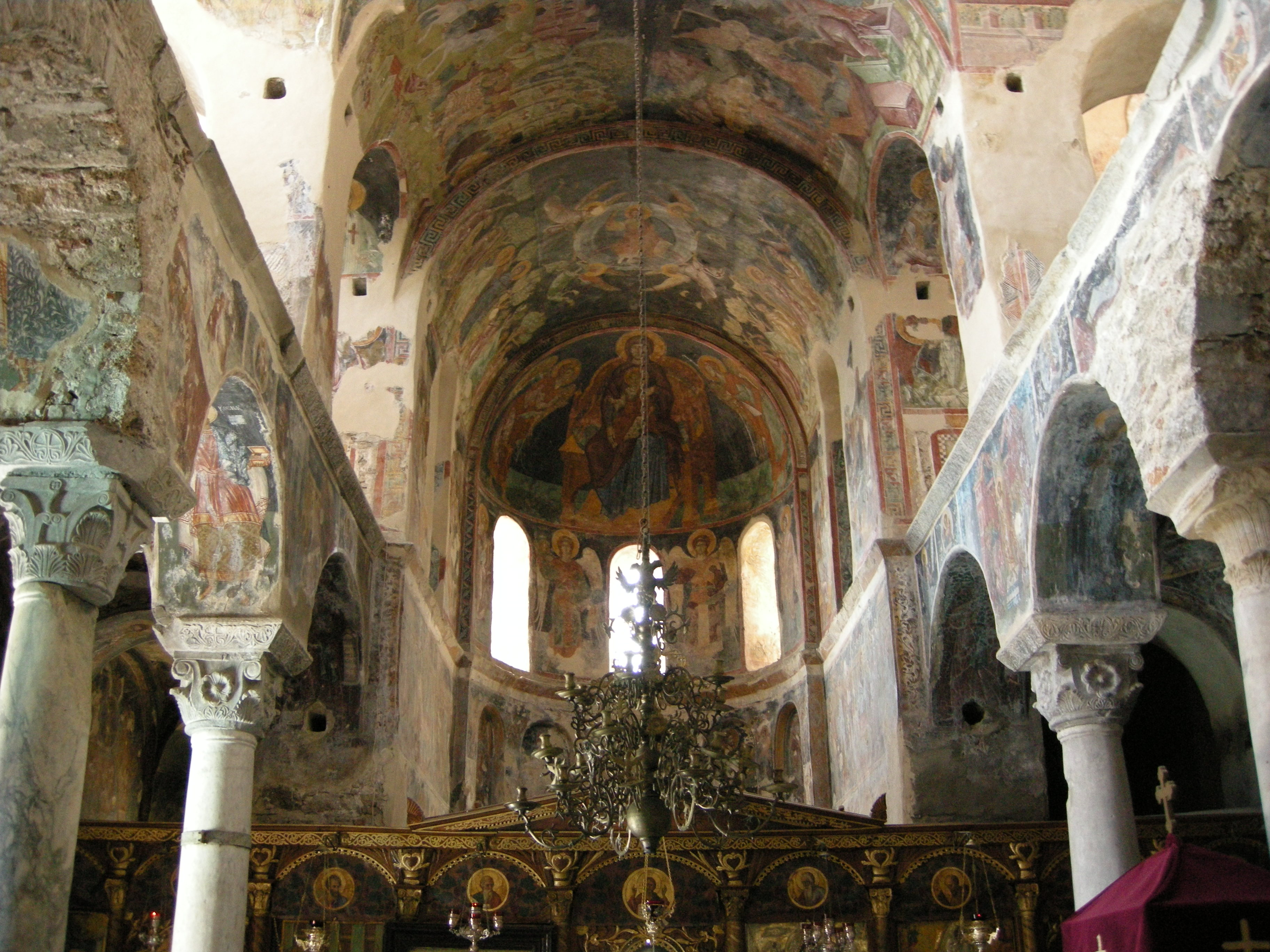 Pantanassa, interno